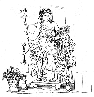 Greek Goddess Demeter